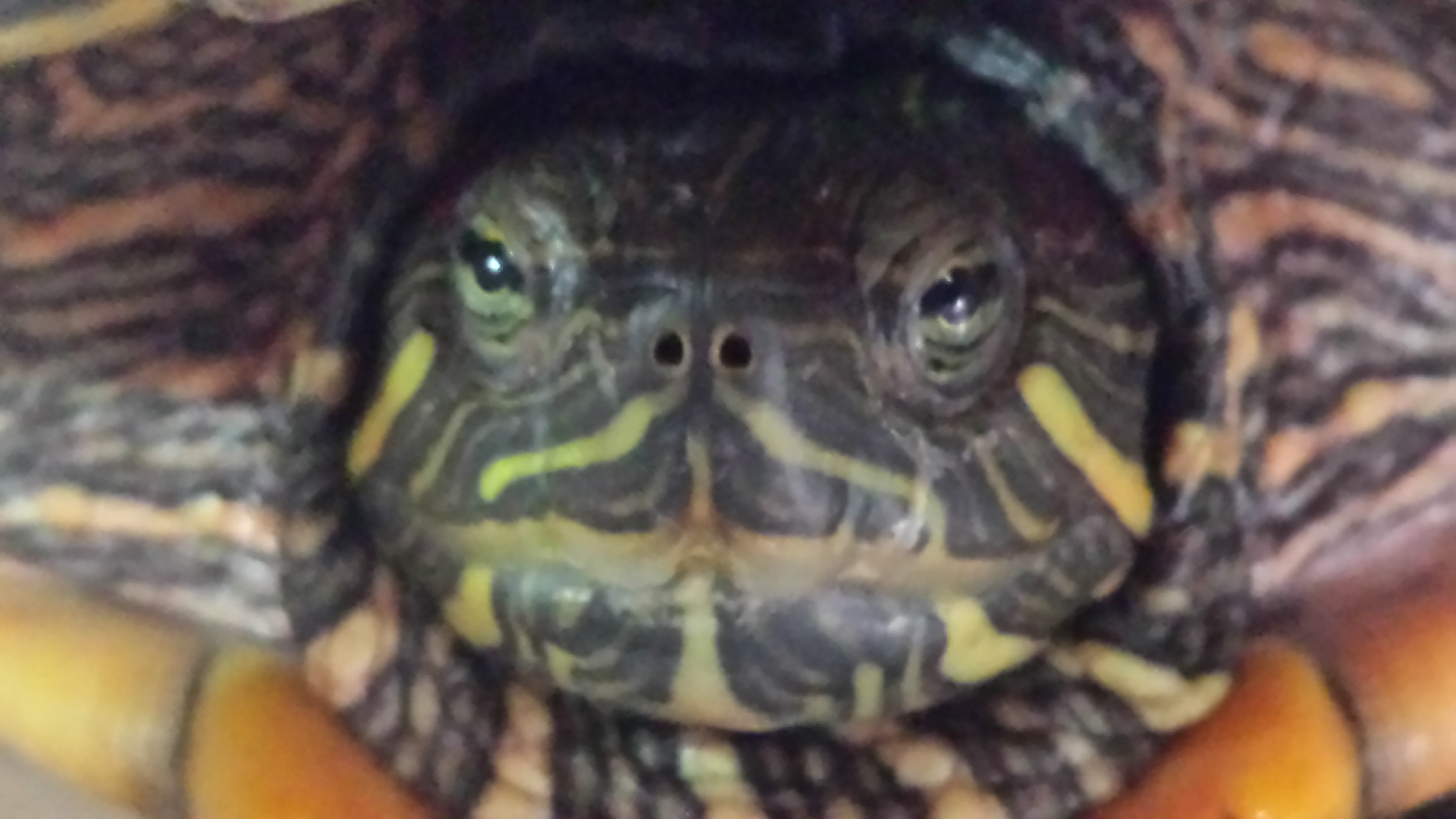 Tortuga.